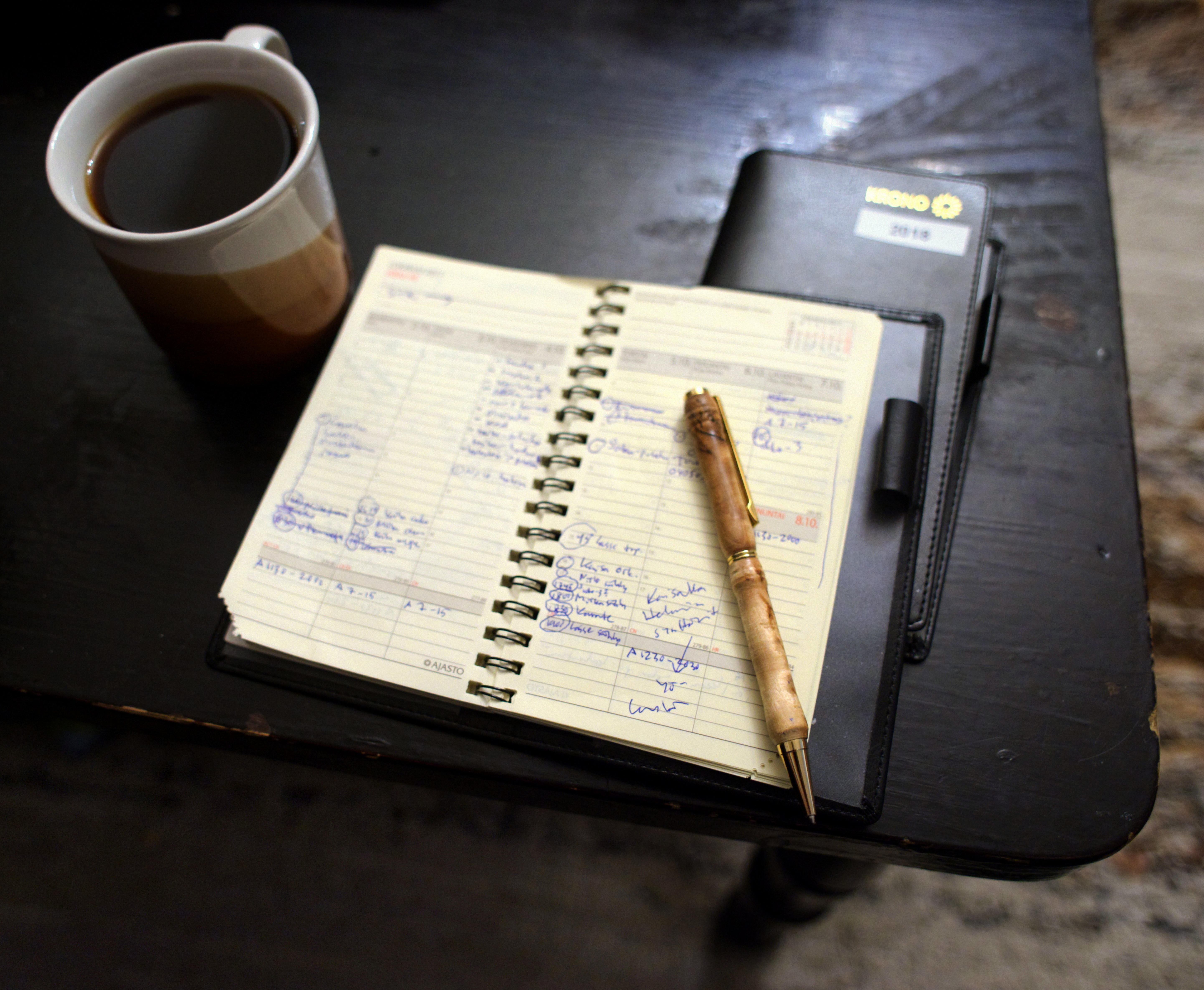 Taskukalenteri